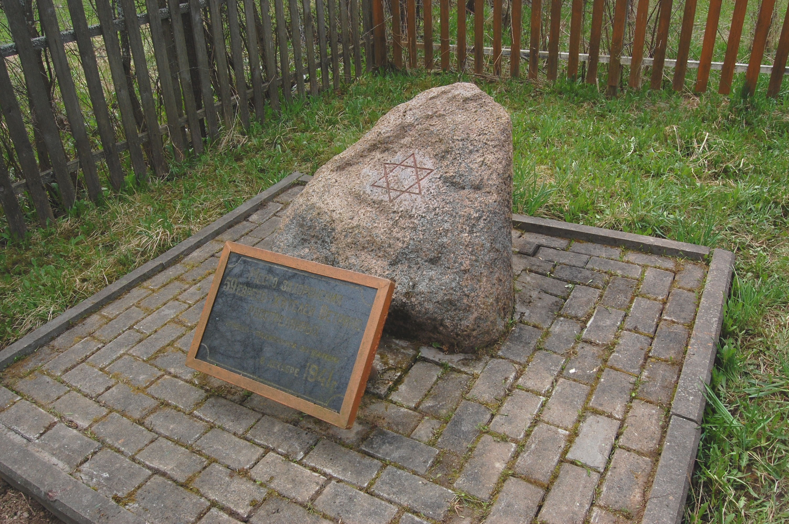 Ветрино, Полоцкий район. Комсомольский переулок - памятник евреям, узникам гетто в Ветрино, убитым в декабре 1941 года.